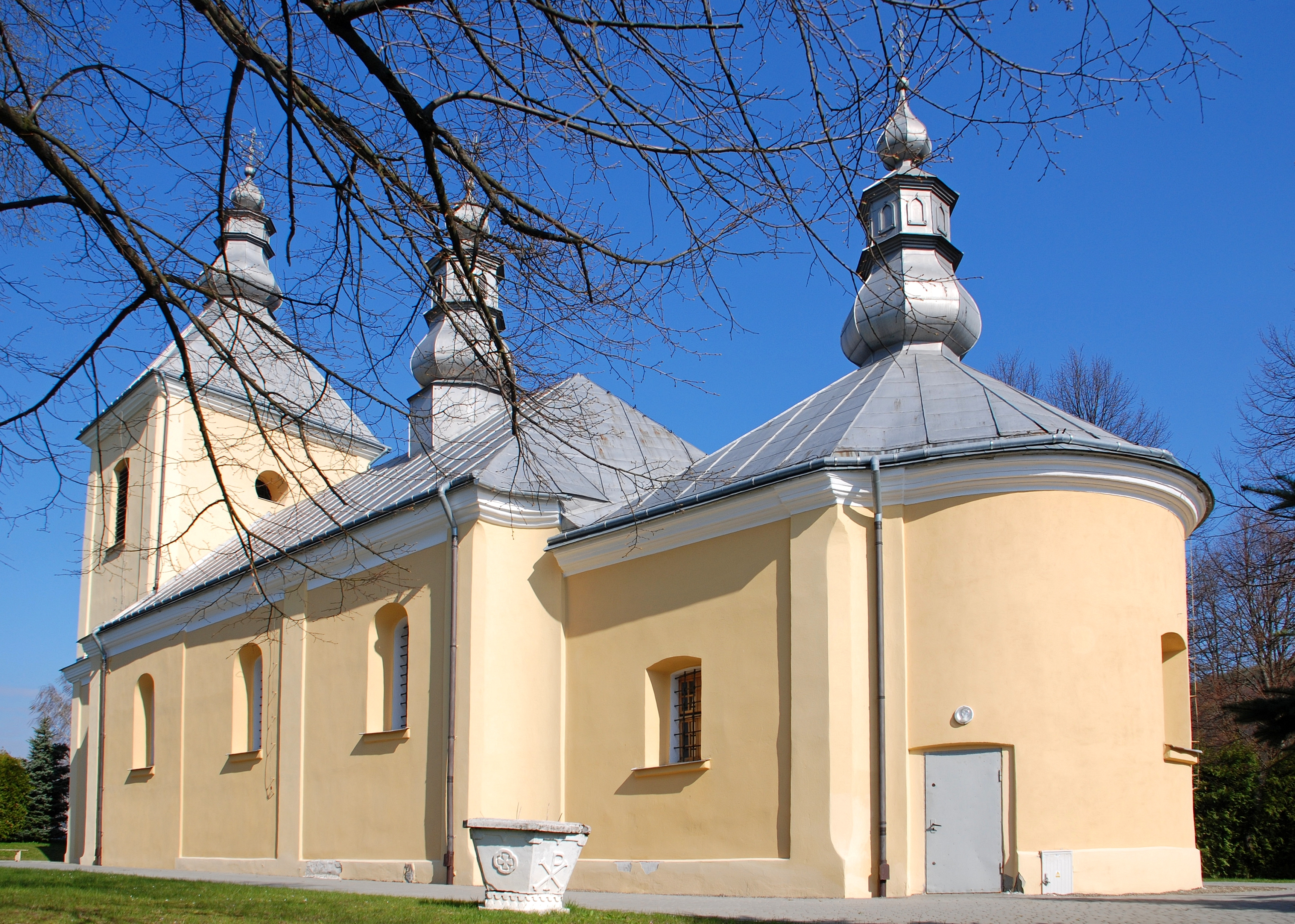 wieś Tylawa